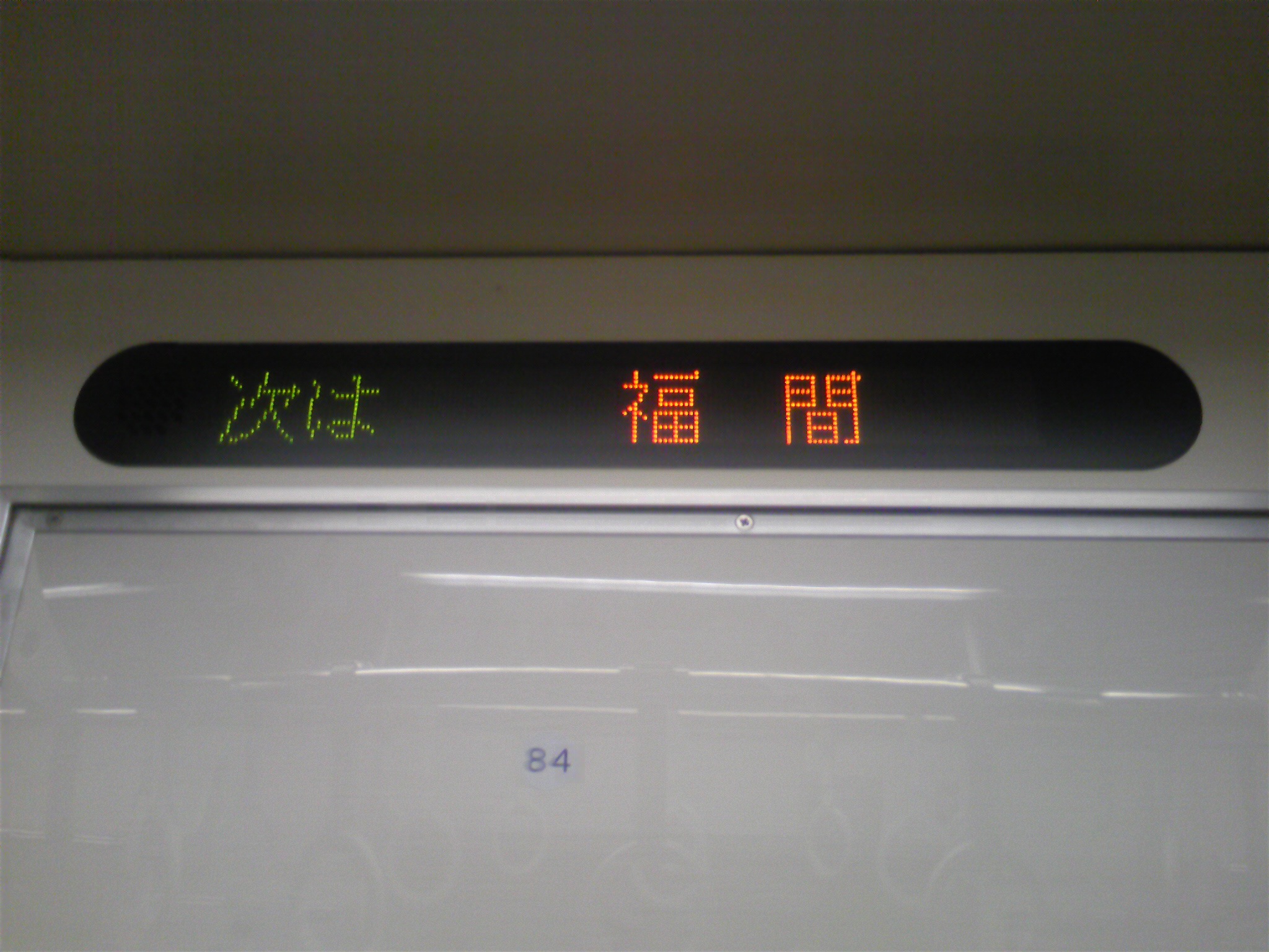 813系 車内案内装置 (R1104編成)